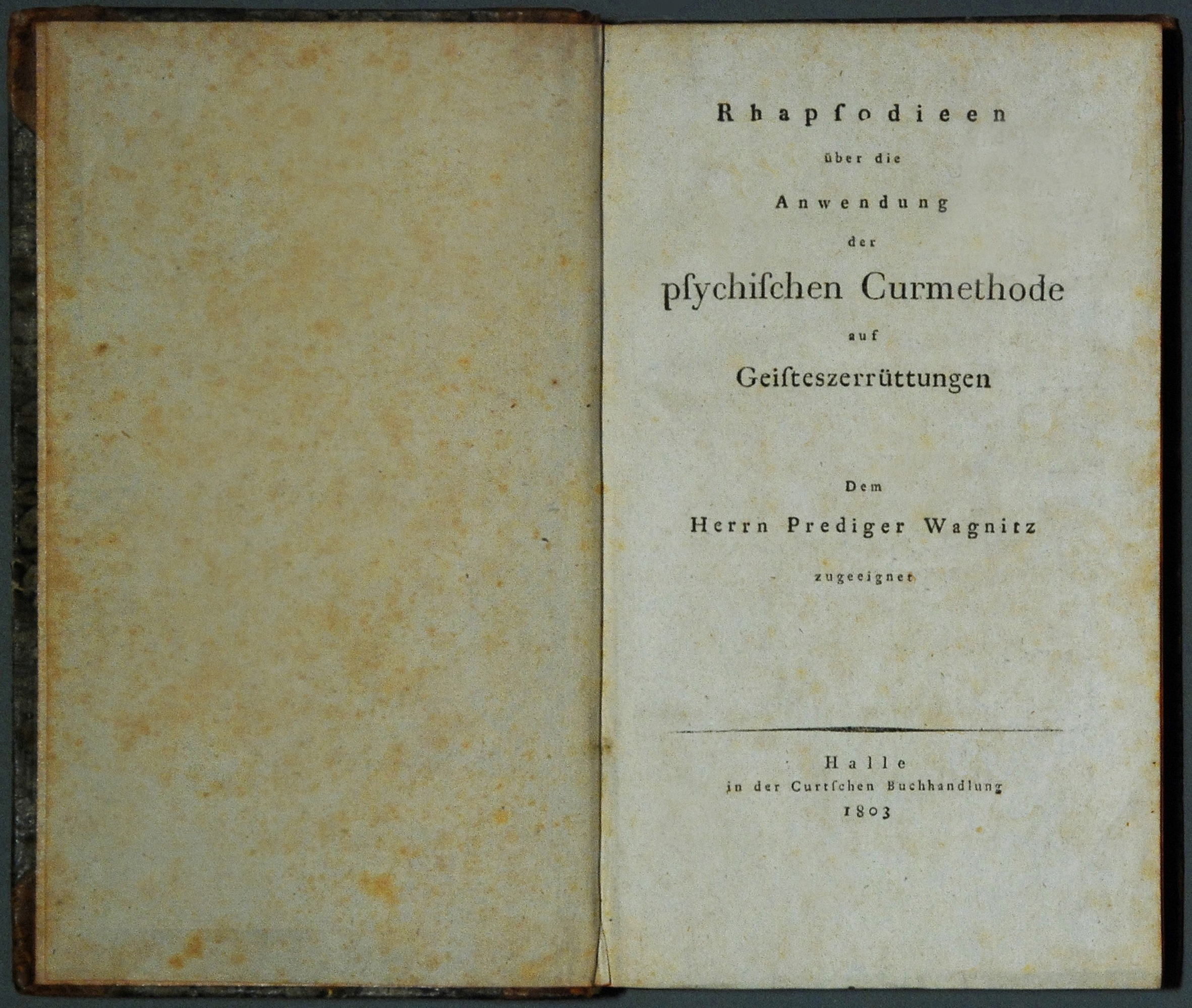 Reil, Johann Christian: Rhapsodieen über die Anwendung der psychischen Curmethode auf Geisteszerrüttungen. Halle: Curt 1803, Erstdruck. Foto bearbeitet (Stempel auf Titel entfernt), keine inhaltlichen Änderungen. Foto für Wikiversity vorgesehen.